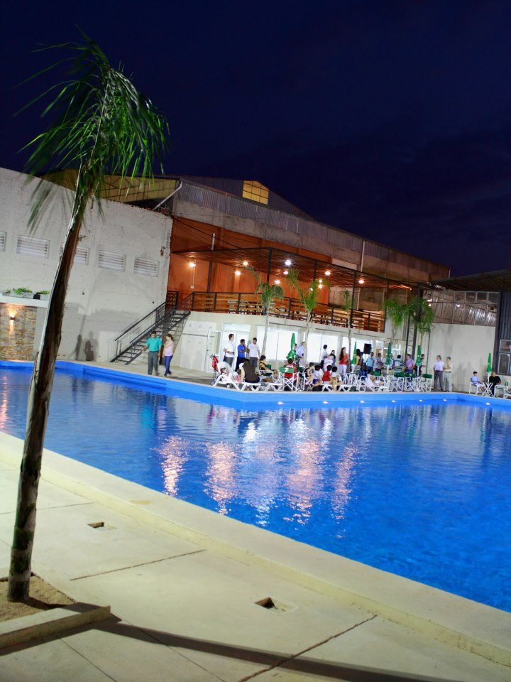 pileta